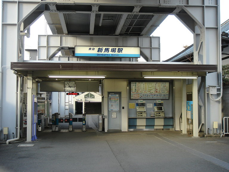 京急本線ja:新馬場駅南口 投稿者↑PON（ウエポン）が2007年1月8日に撮影 一部編集の上で、2007年1月30日にアップロード